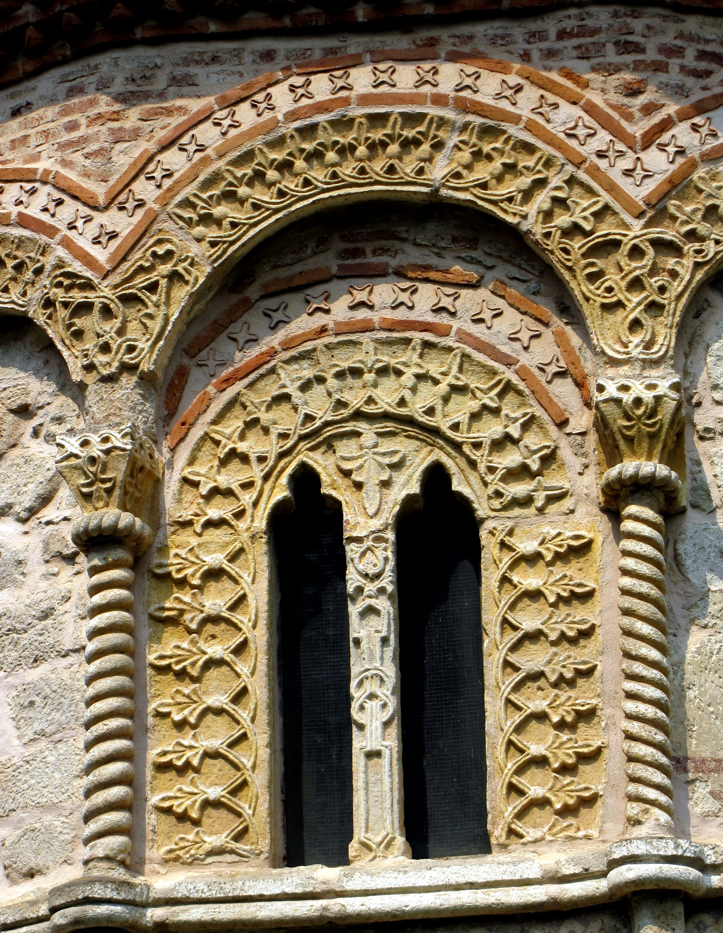 Манастирски храм посвећен је Успењу Пресвете Богородице, Налази се на неколико километара од Трстеника, поред Љубостињске реке, Градња цркве започета је пре Косовског боја, а завршена око1404. године, као задужбина кнегиње Милице, која се овде замонашила када је управу државом предала сину Стефану, У турским пописима помиње се као манастир са неколико монаха, У манастиру је боравио велики број значајних личности српске историје, Старо сликараство је очувано само у деловима, У манастирској цркви сахрањени су кнегиња Милица, монахиња Јефимија, и млади Стефан Мрњавчевић, У Љубостињи је била развијена преписивачка делатност и негована лепа реч.